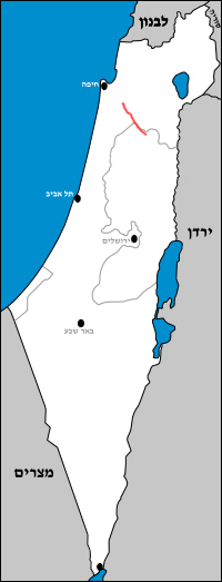 כביש 66